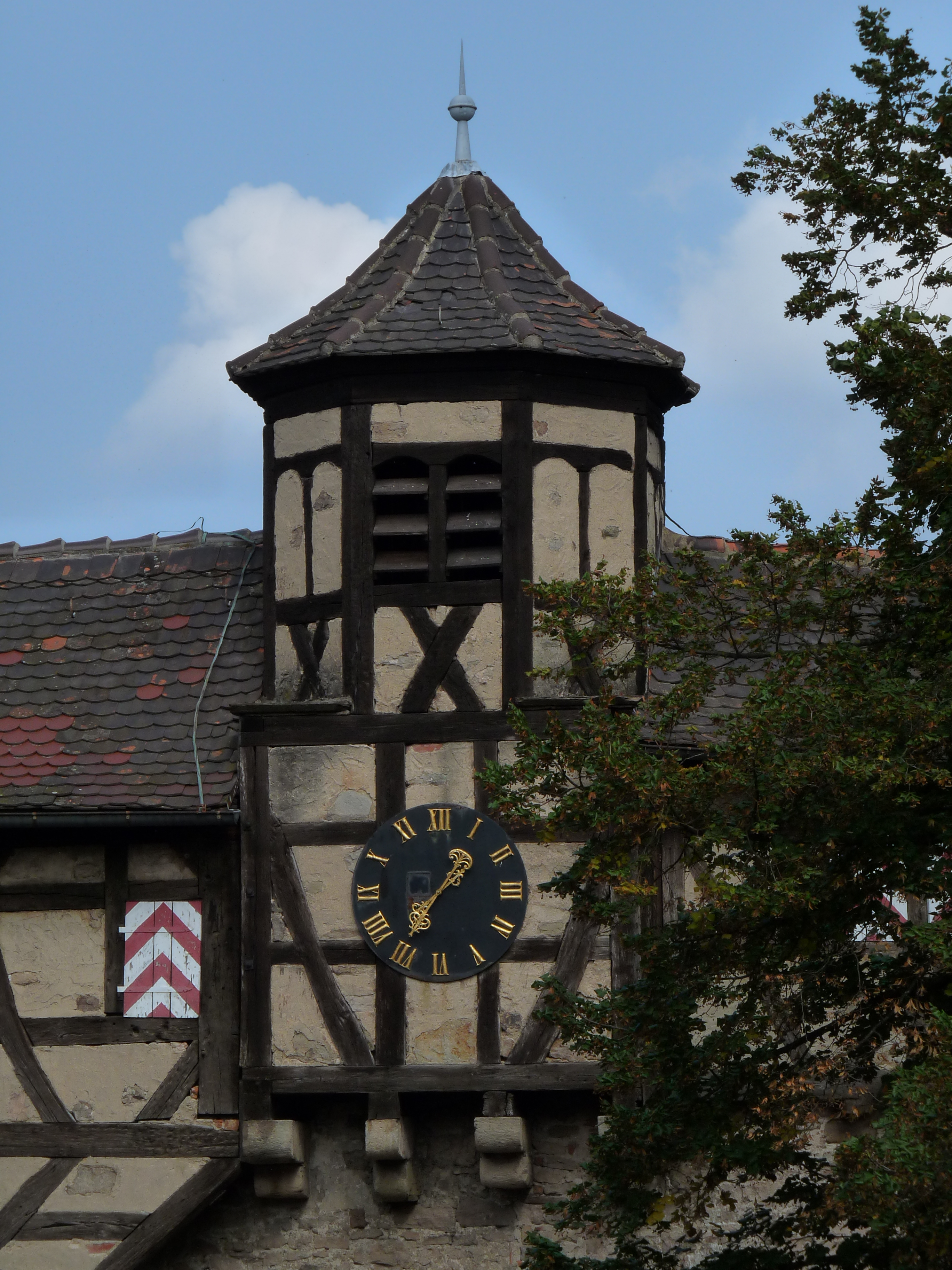 Oberstenfeld - Burg Lichtenberg - Burghof - Uhr & Glockenturm